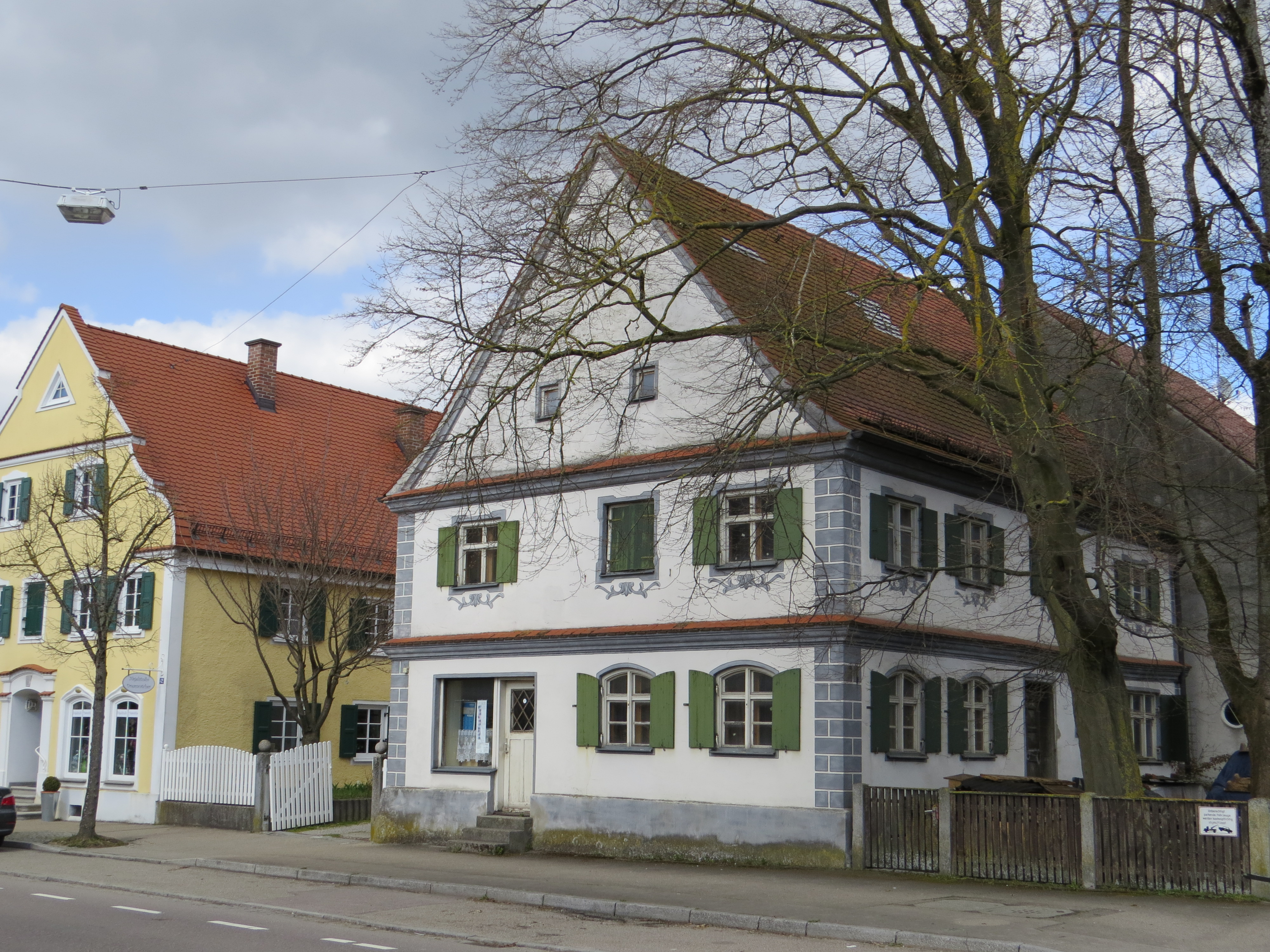 Bahnhofstr. 40 in Thannhausen